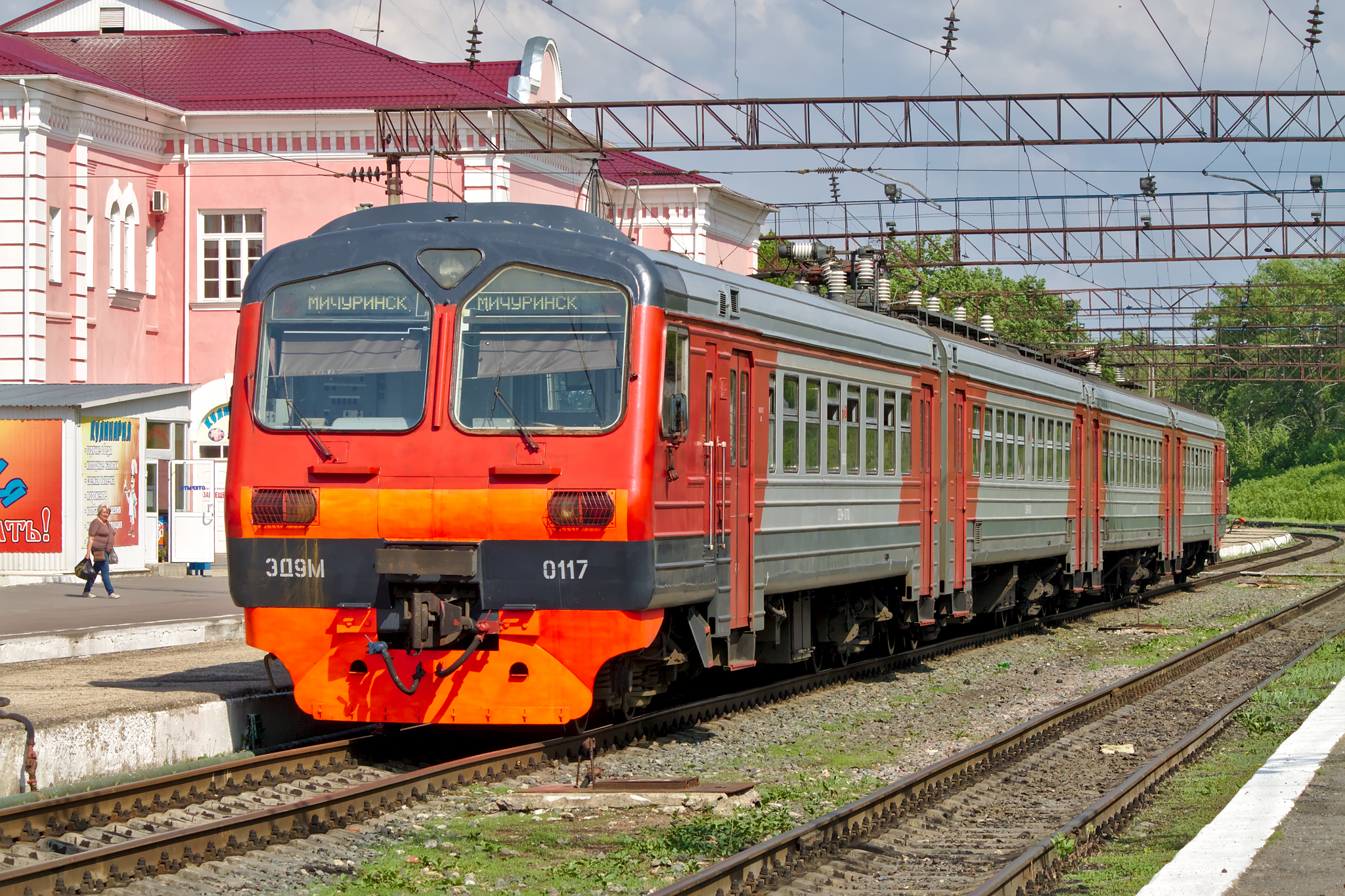 ЭД9М-0117, станция Елец. см. фото 593332 в альбоме автора